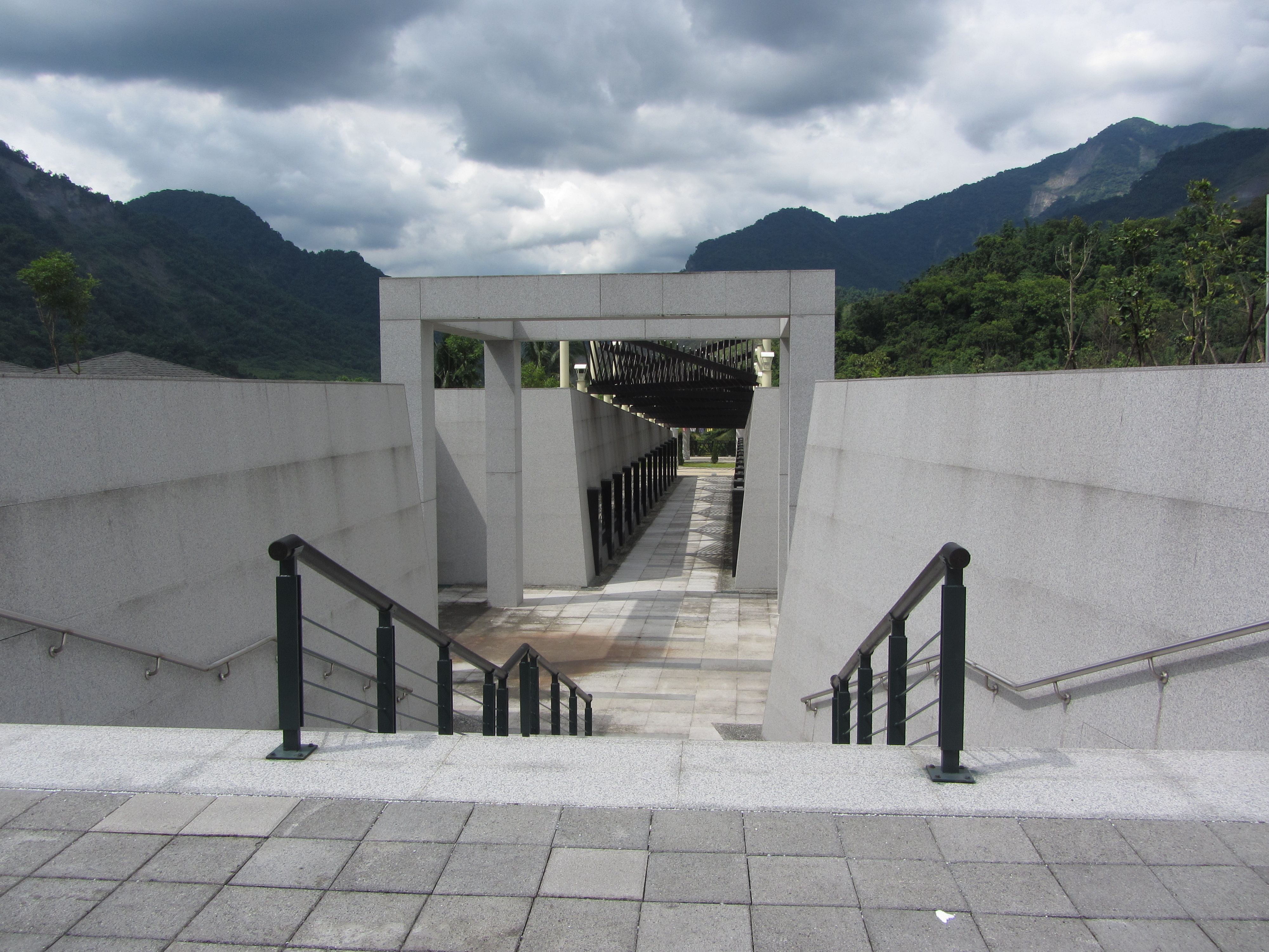 小林村紀念公園的苦路